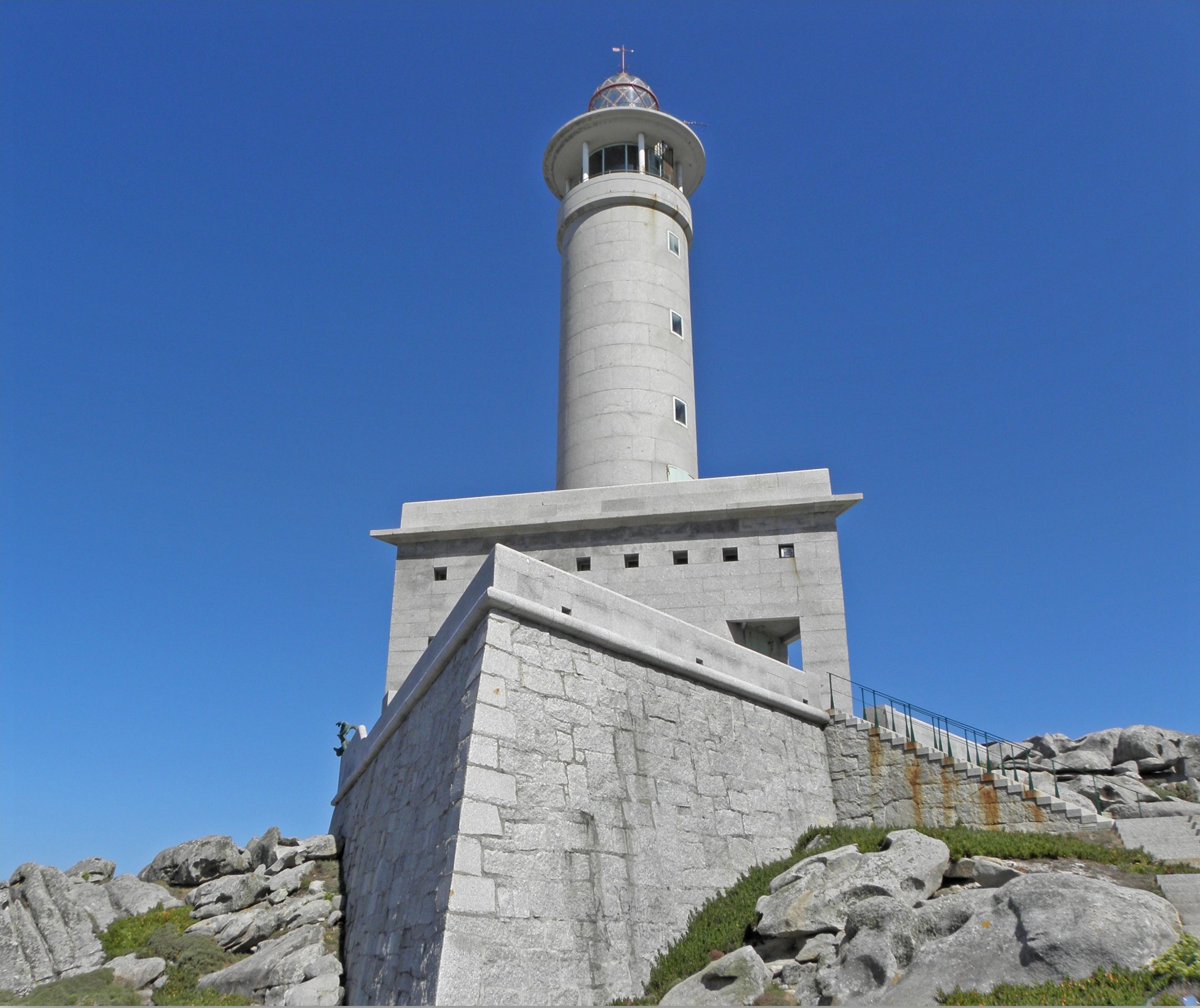 El Faro de Punta Nariga , esta en funcionamiento desde 1997, fue diseñado por el arquitecto César Portela. Rerepresenta un barco de piedra que nos introduce en el mar. El faro es un precioso barco de granito que se fusiona perfectamente con la costa rocosa del entorno. Como mascarón de proa, se situa un atlante del escultor Manolo Coia que reta al furioso mar. Desde la borda de este singular barco se ve el inmenso océano, situandose a la izquierda la zona de O Roncudo en Corme y a la derecha las Islas Sisargas.